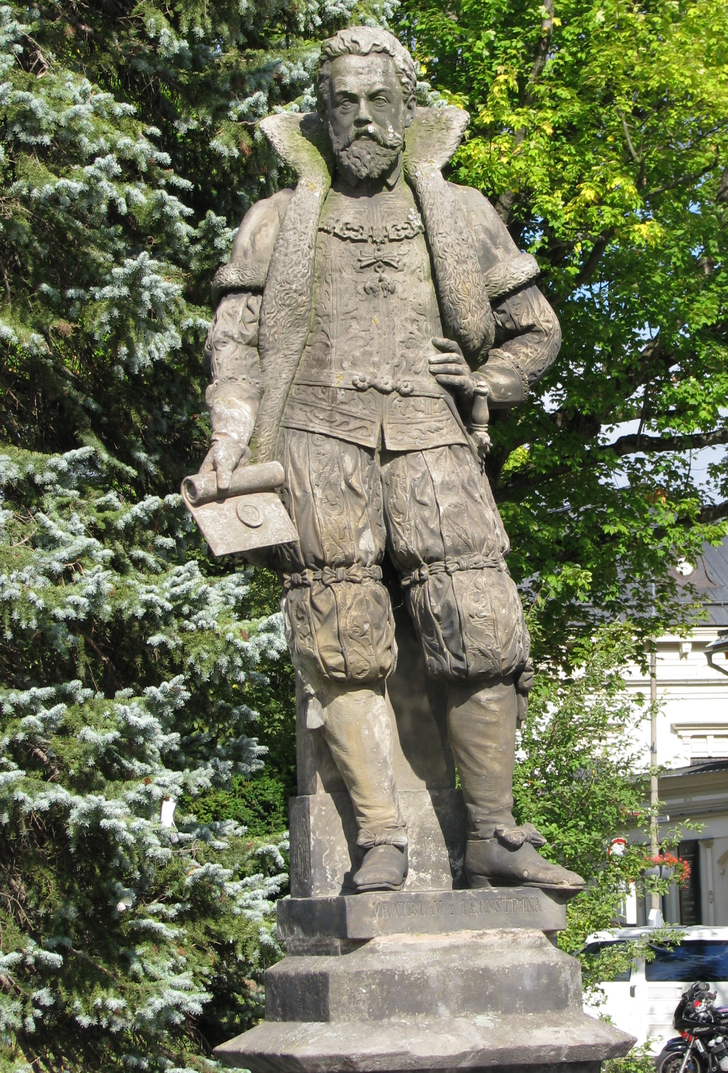 Kašna se sochou Vratislava z Pernštejna, Nové Město na Moravě. Autorem sochy je Karel Dvořák. V roce 1902 památku restauroval sochař Jan Štursa.